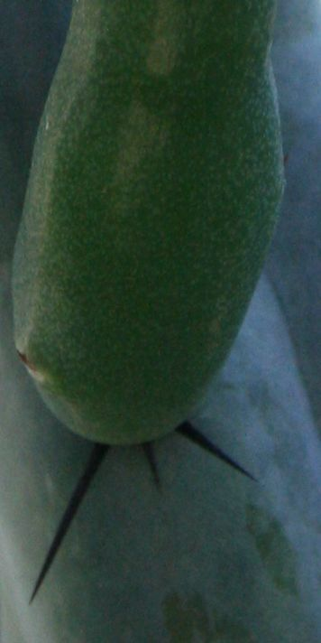 Cereus spegazzinii areoláján fejlődő virág